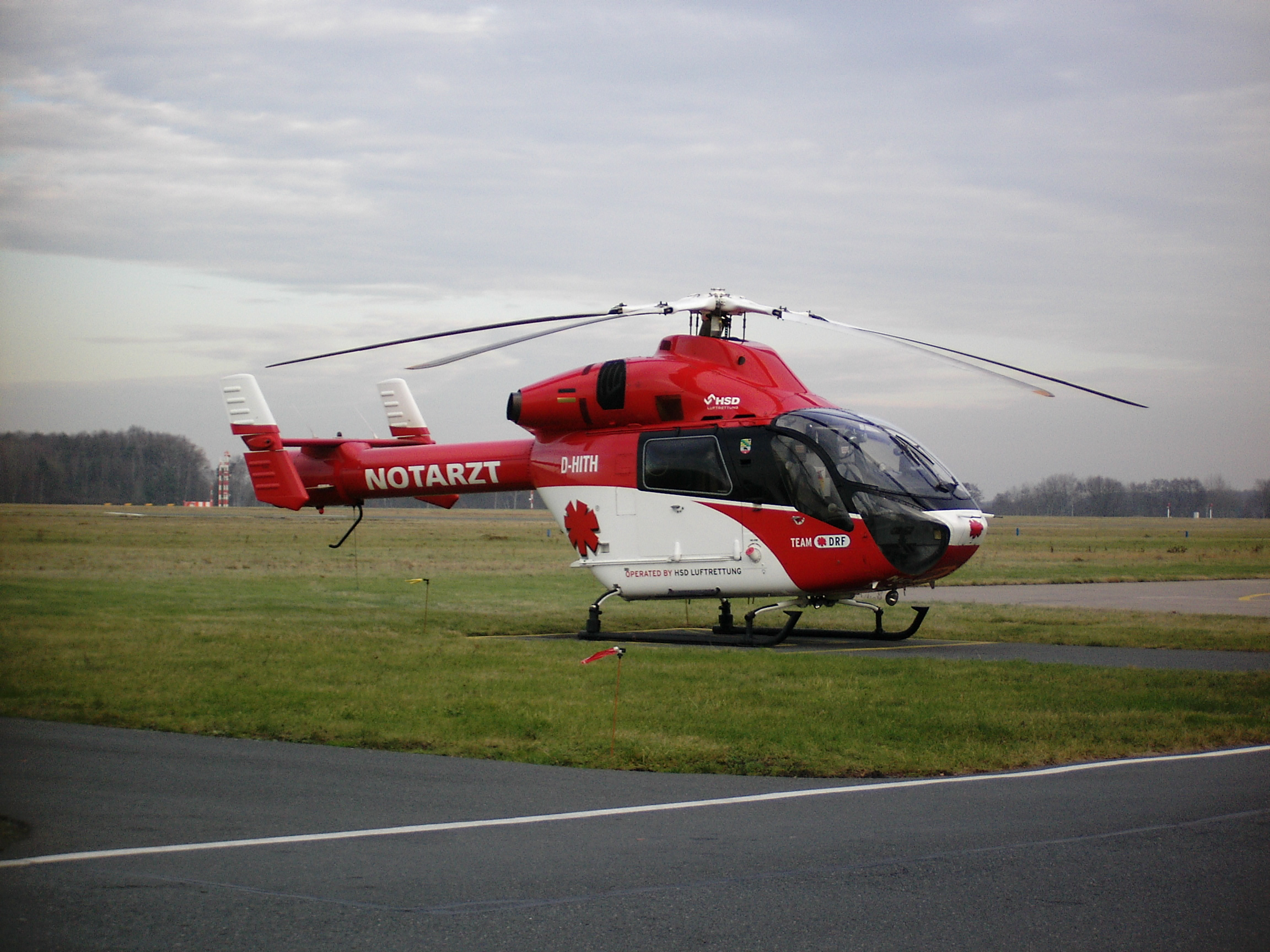 MD 900 Deutsche Rettungsflugwacht